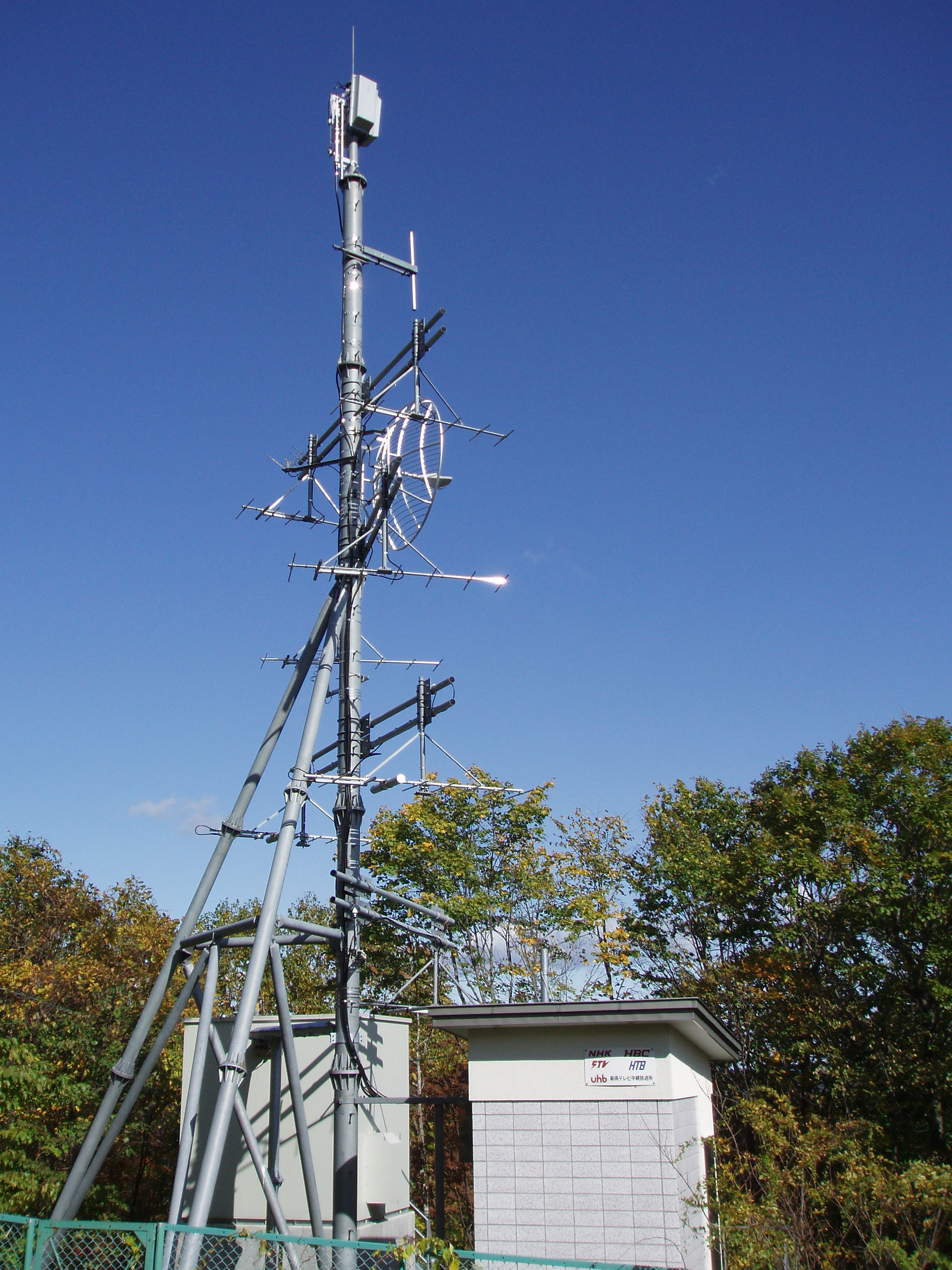 新得中継局（デジタル設備増設）